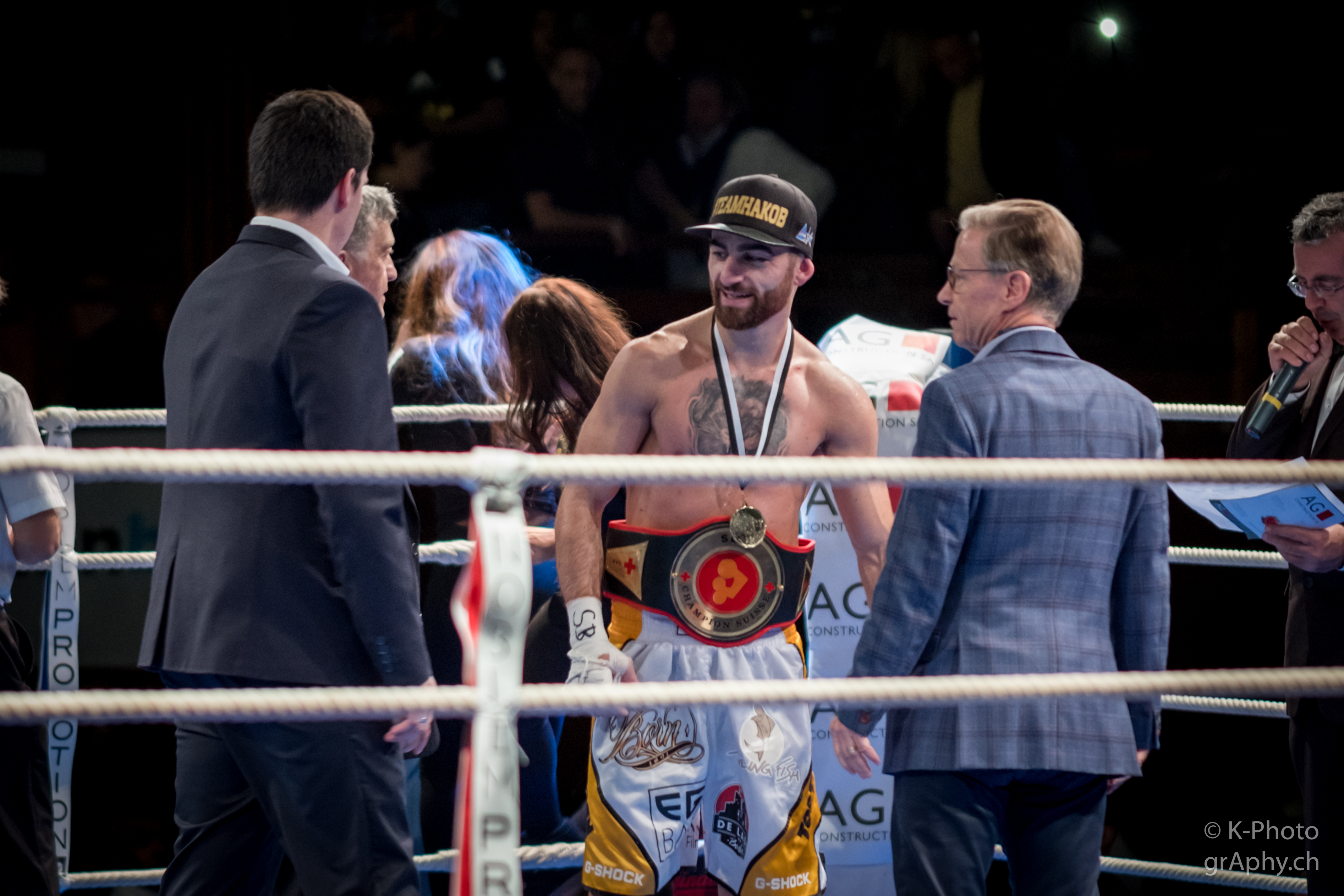 Sieg - Schweizermeisterschaft - 24.11.2017 Genf